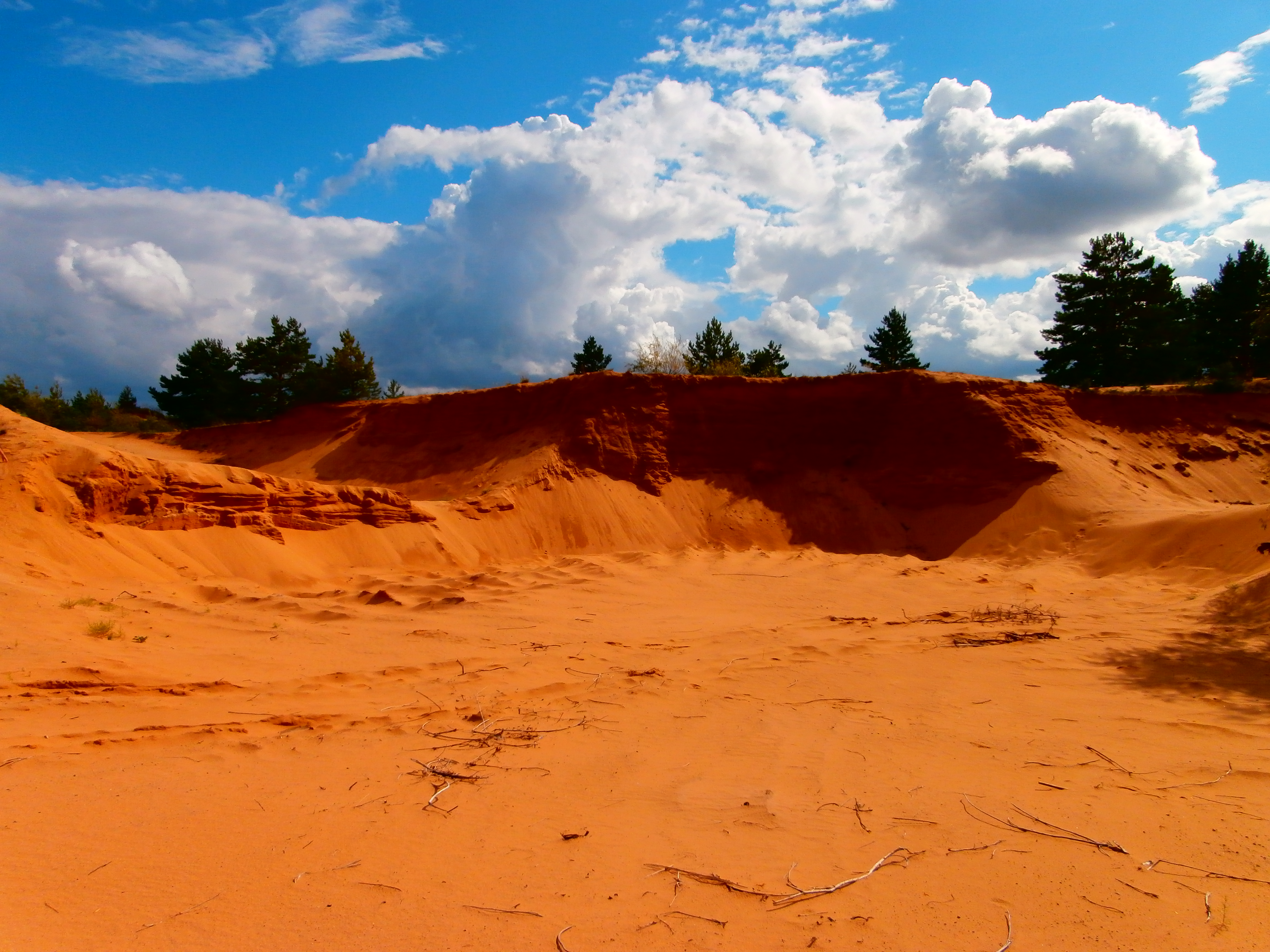 яркий песок